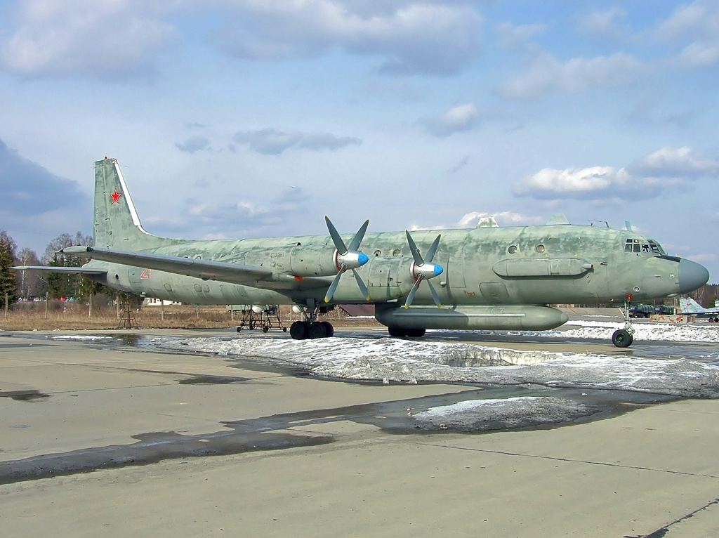 Ил-20М (бортовой №21 красный, cn 173011504) на ародроме Кубинка